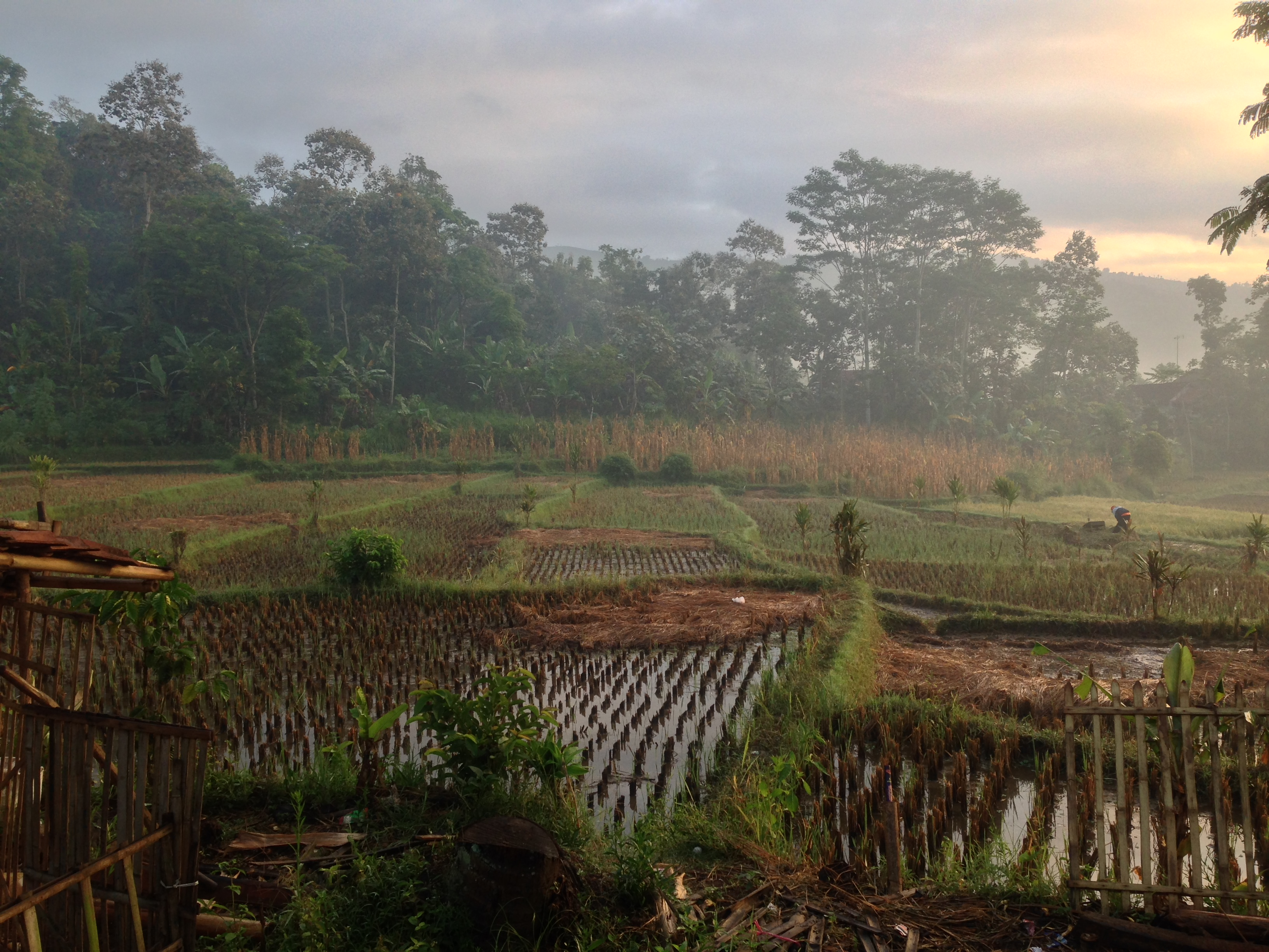 Keindahan desa Simpen Kidul, Garut